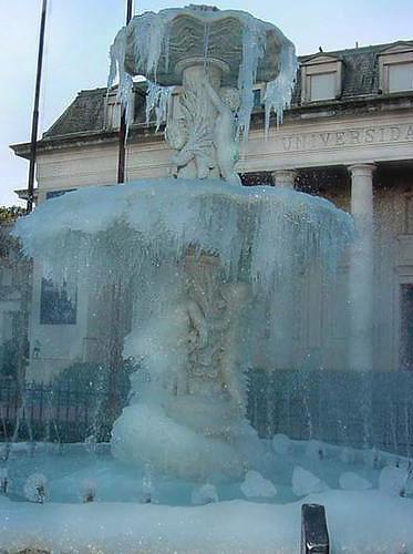 Fuente de Lola Mora congelada, Bahía Blanca, Argentina. Nota. Si bien popularmente se la conoce como la "Fuente de Lola Mora", solamente los capullos laterales de la misma son obra de esta famosa escultora tucumana. El plato central de la fuente fue realizado en Italia.